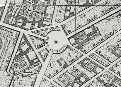 La place des Victoires en 1728. Détail du plan de Delagrive